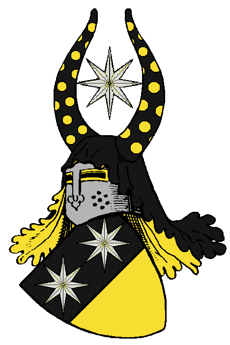 Stammwappen der Grafen zu Nidda.